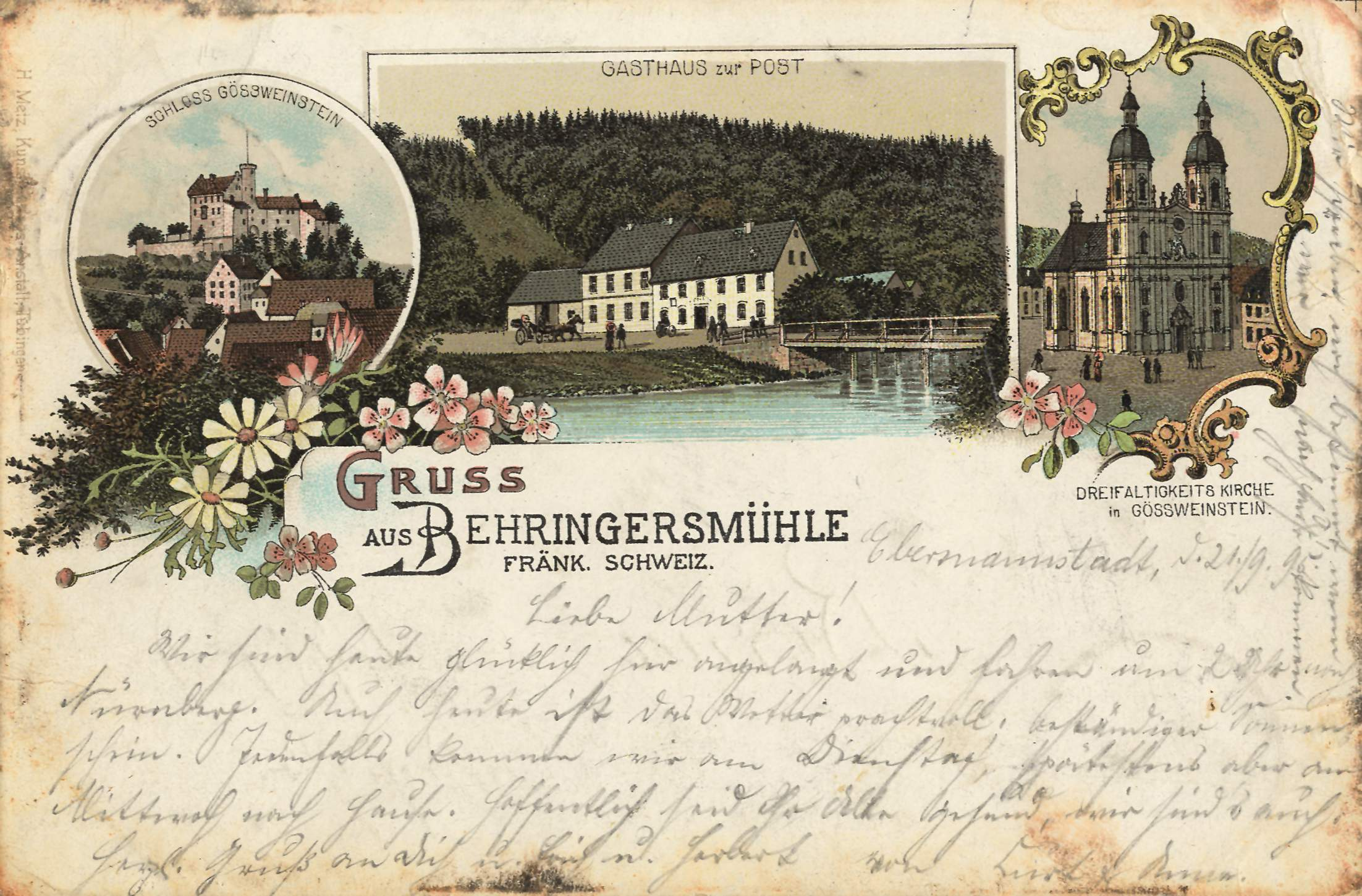 Schloss Gößweinstein, Behringersmühle, Dreifaltigkeitskirche in Gößweinstein